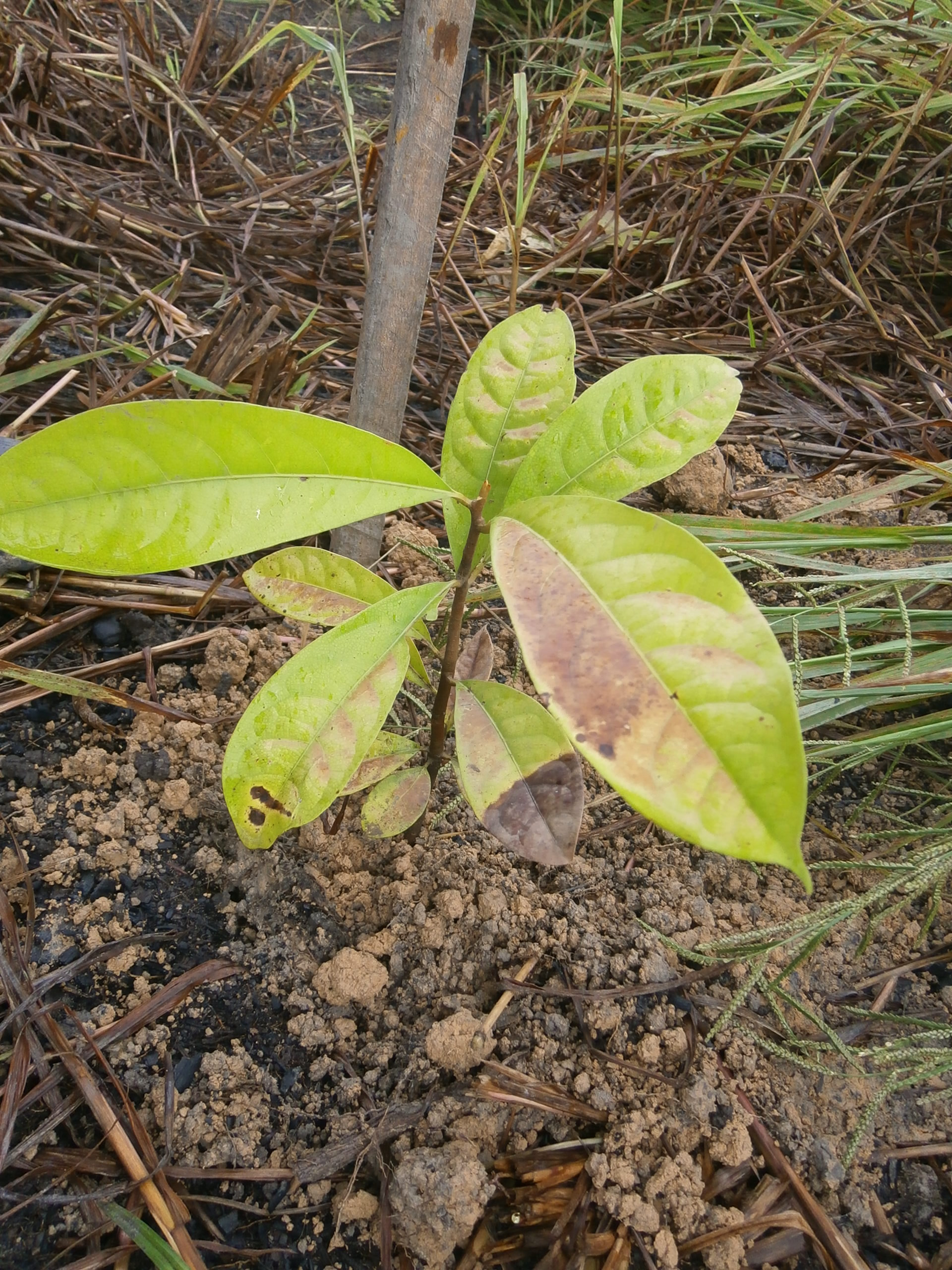 USO DA ESPECIE -Destaca-se na produção de óleo essencial de aroma agradável, rico em linalol e muito utilizado na indústria de perfumaria como fixador O óleo é obtido a partir da destilação de qualquer parte da planta, porém a madeira tem sido sua fonte principal. Diferenças no rendimento, nas propriedades físico-químicas e no aroma foram encontradas em função da parte da planta utilizada e das variações intraespecíficas. O óleo das folhas possui aroma adocicado e o da madeira apresenta aroma semelhante à lavanda devido a maior concentração de linalol dextro e linalol laevo, respectivamente. Diferenças no aroma também são evidentes entre óleos oriundos de regiões distintas, como as verificadas entre o óleo brasileiro e o franco-guianense..